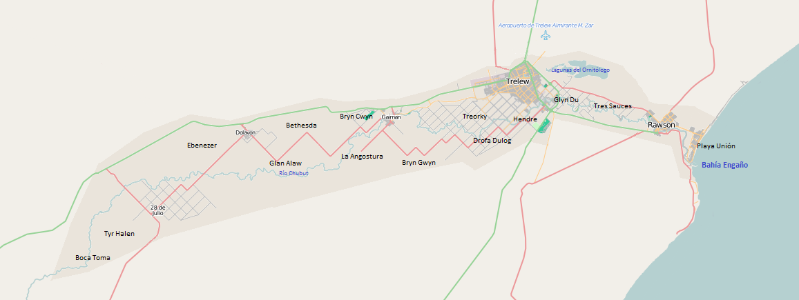 Mapa del Valle inferior del Río Chubut con ciudades, zonas rurales y rutas principales, realizado a través del Open Street Map